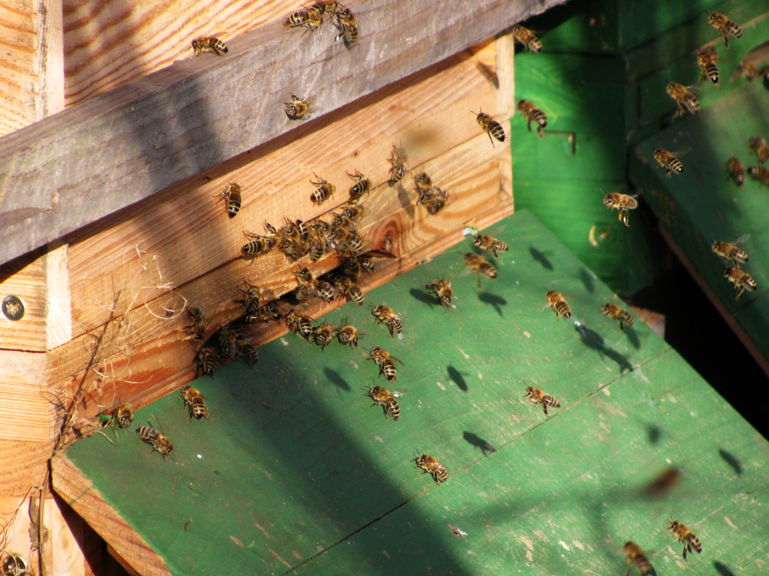 Bienen in der Kleingartenanlage Rottmannshof (Bochum)